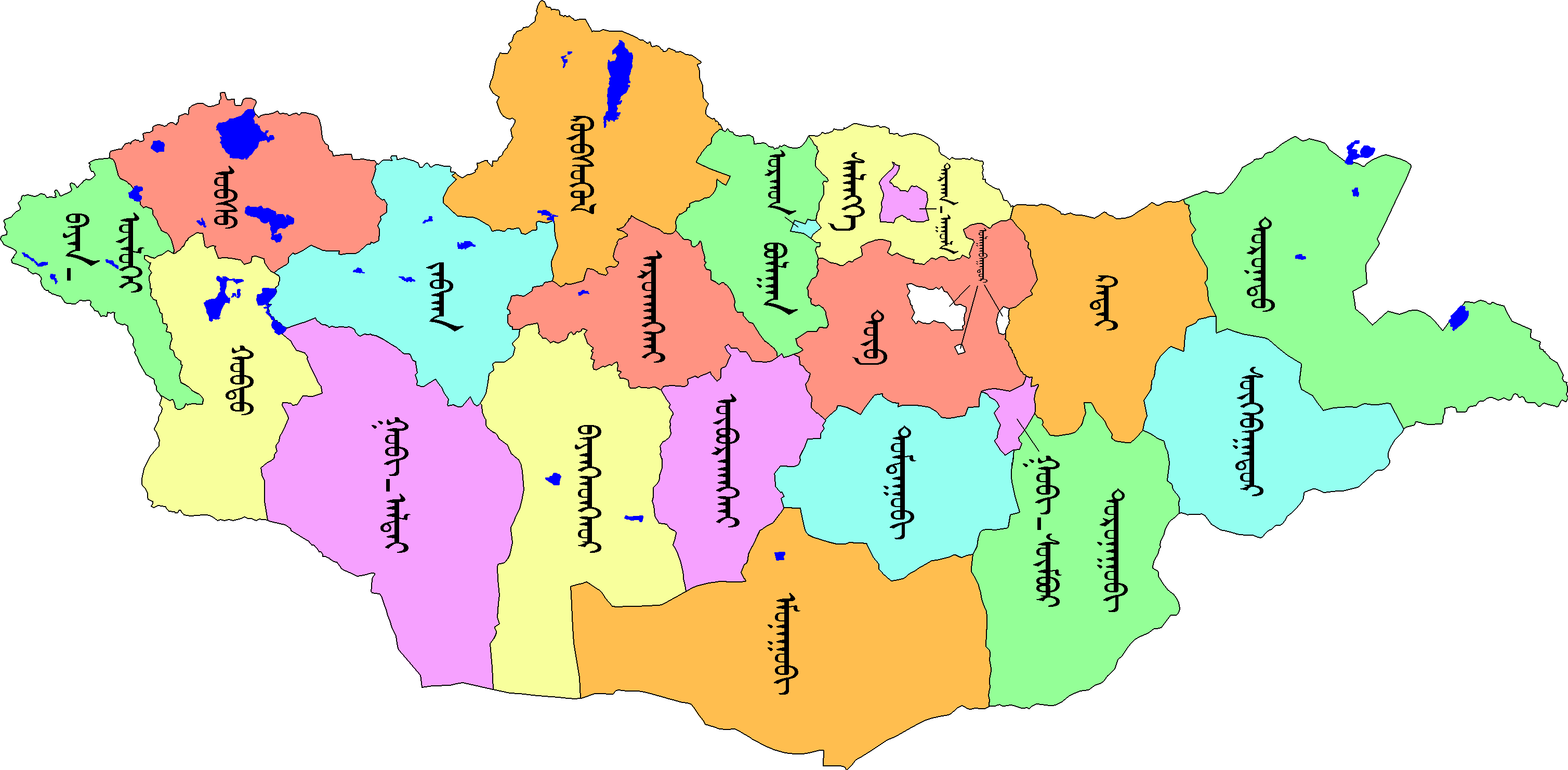 Монгол: Аймгуудын газрын зураг, Монгол бичиг